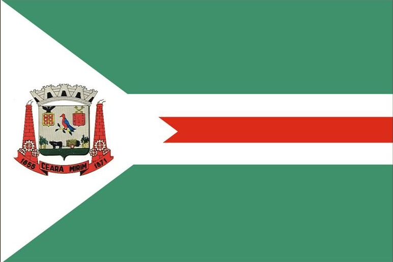 Bandeira de Ceará-Mirim, Rio Grande do Norte, Brasil